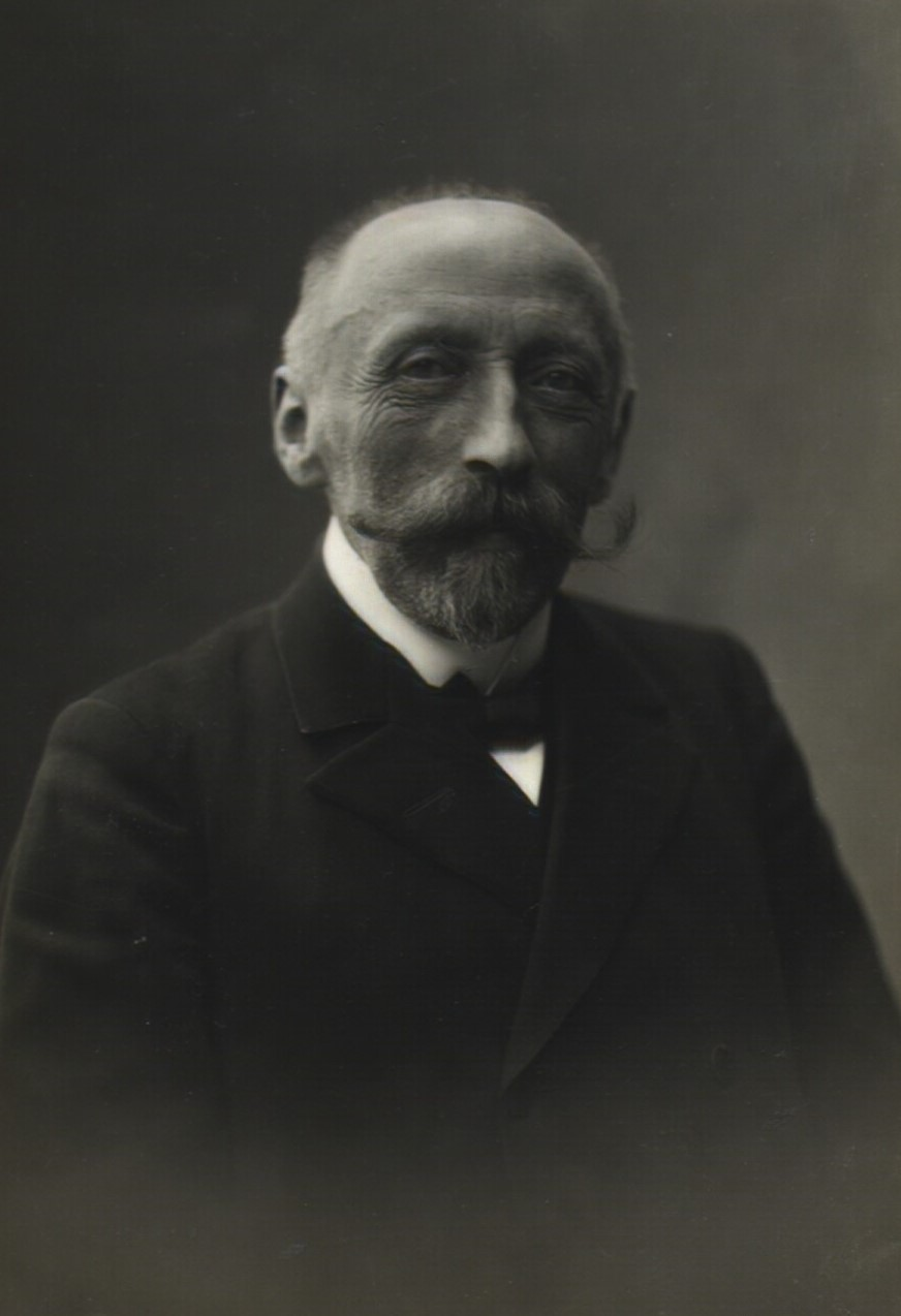 Enevold Frederik Adolf Sørensen (21. september 1850 - 1920) var bladredaktør, politiker og minister Enevold Sørensen